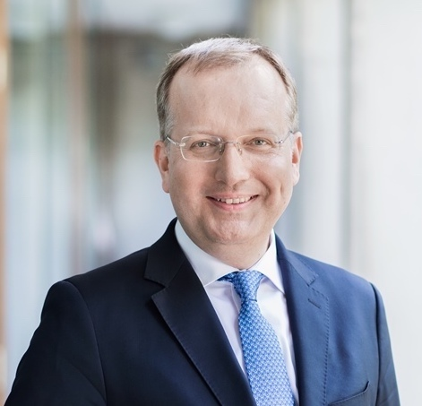 Pressebild Markus Ogorek